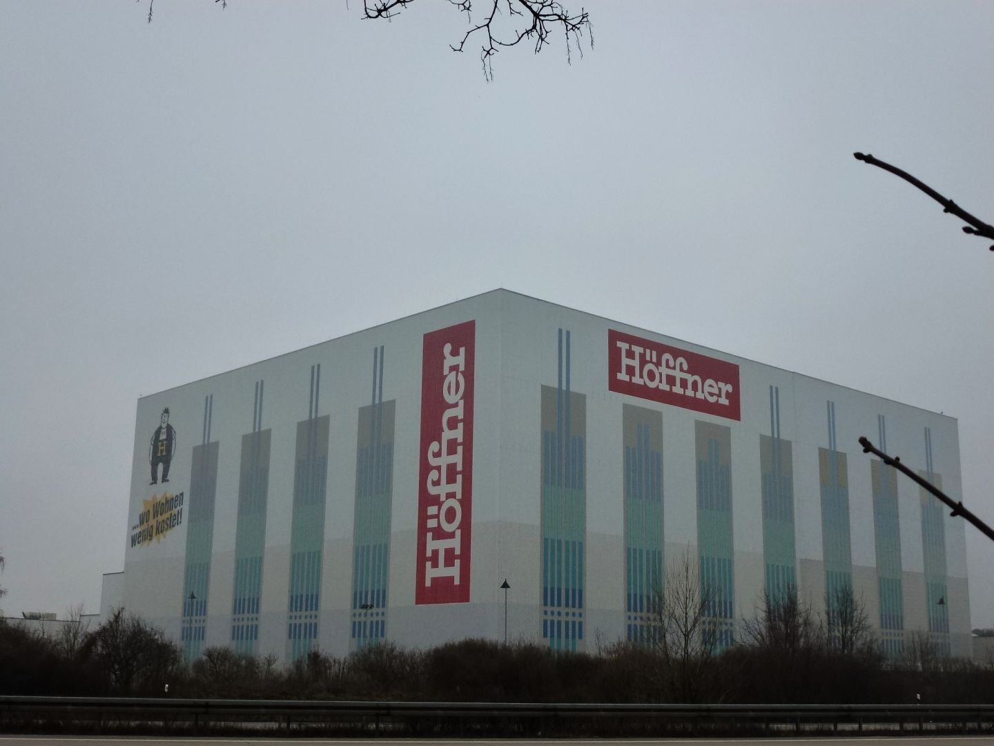 Möbelhaus am Rande des Einkaufszentrums Nova Eventis